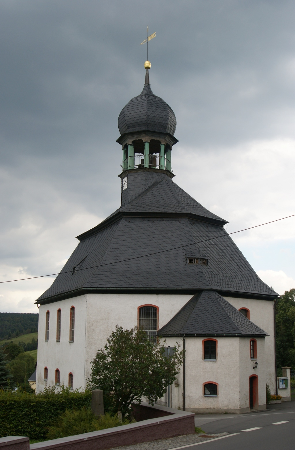 Kirche Rübenau